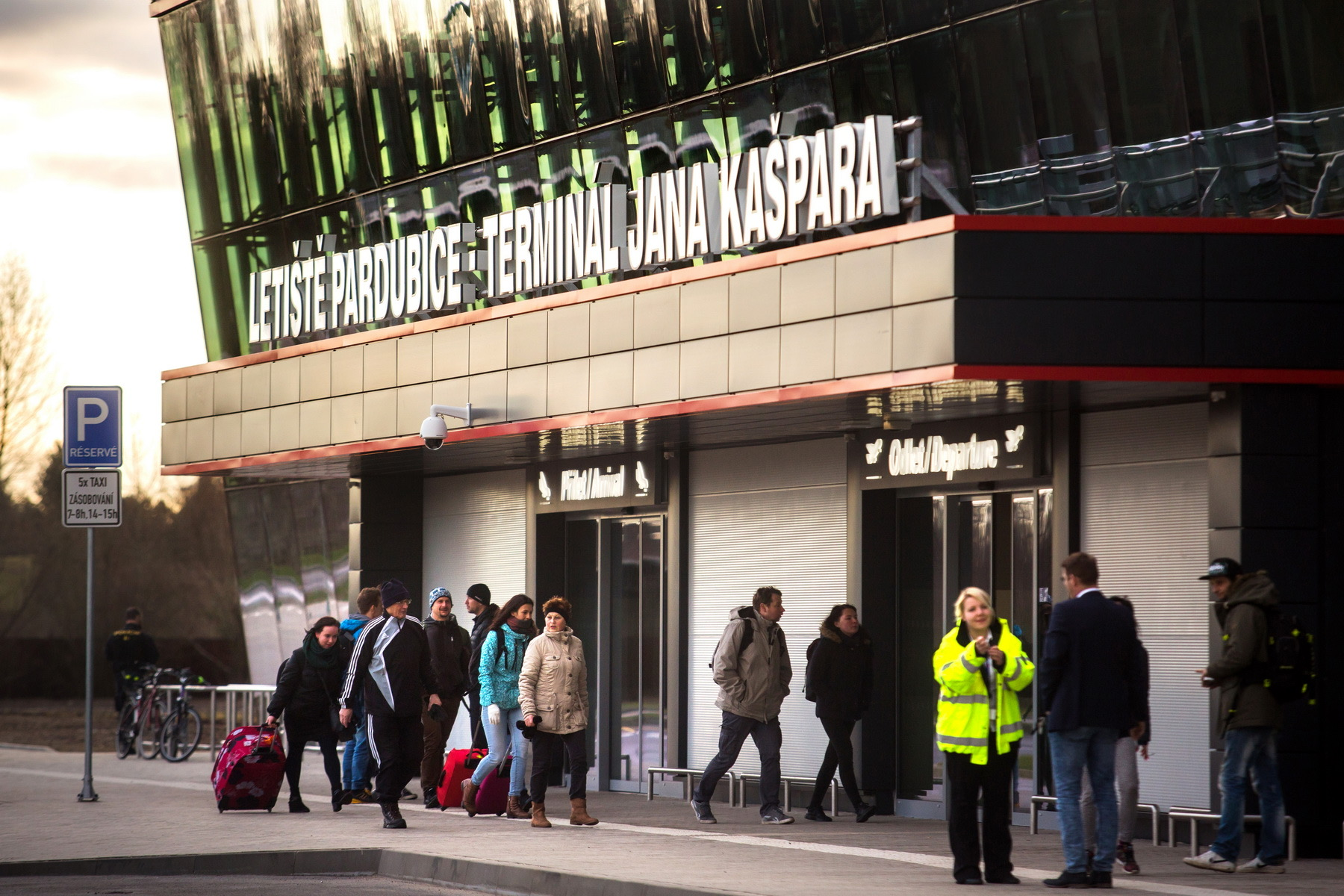 Pohled na nový terminál Jana Kašpara.